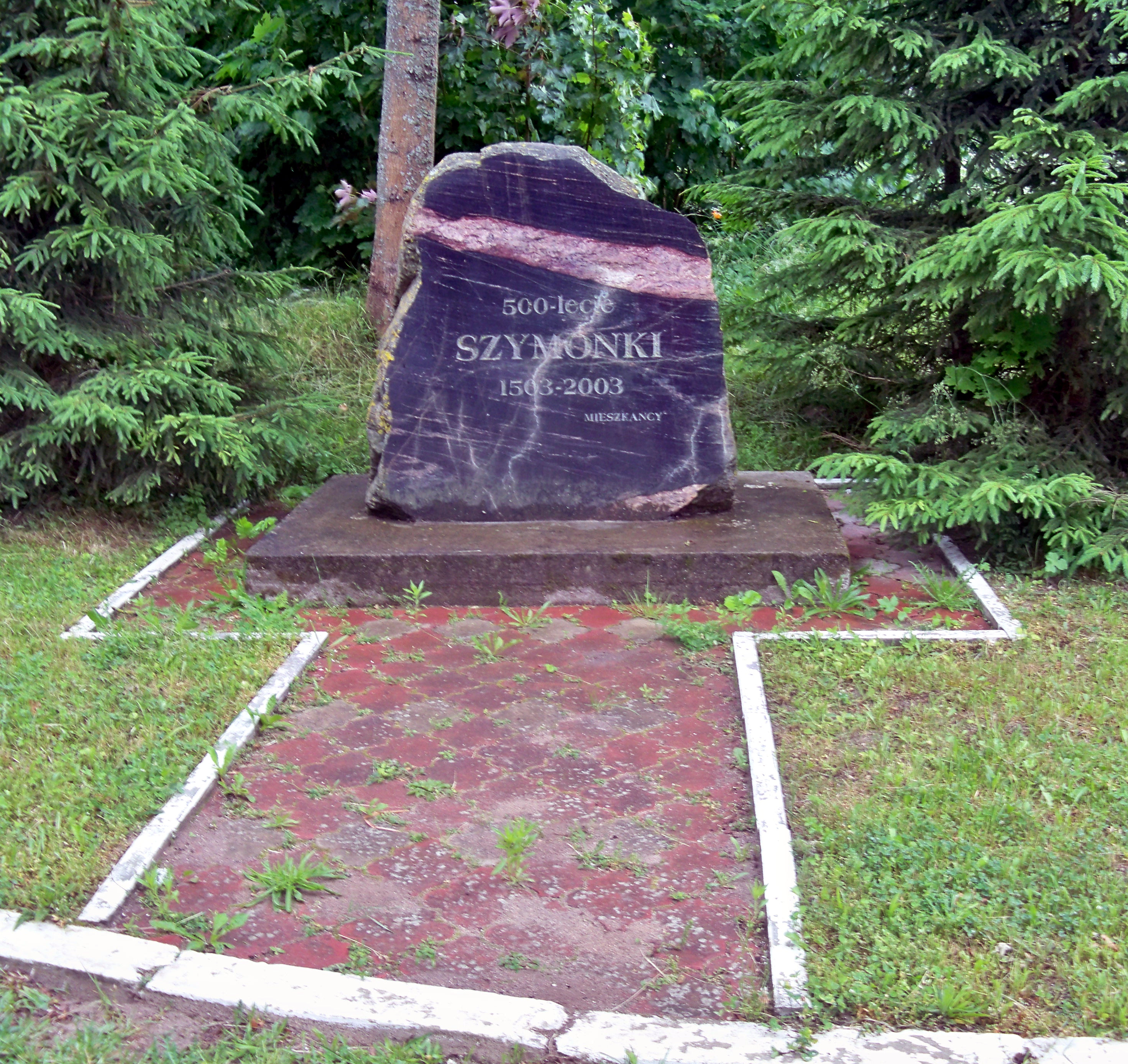 Szymonka (gmina Ryn). Głaz upamiętniający pięćsetlecie wsi.